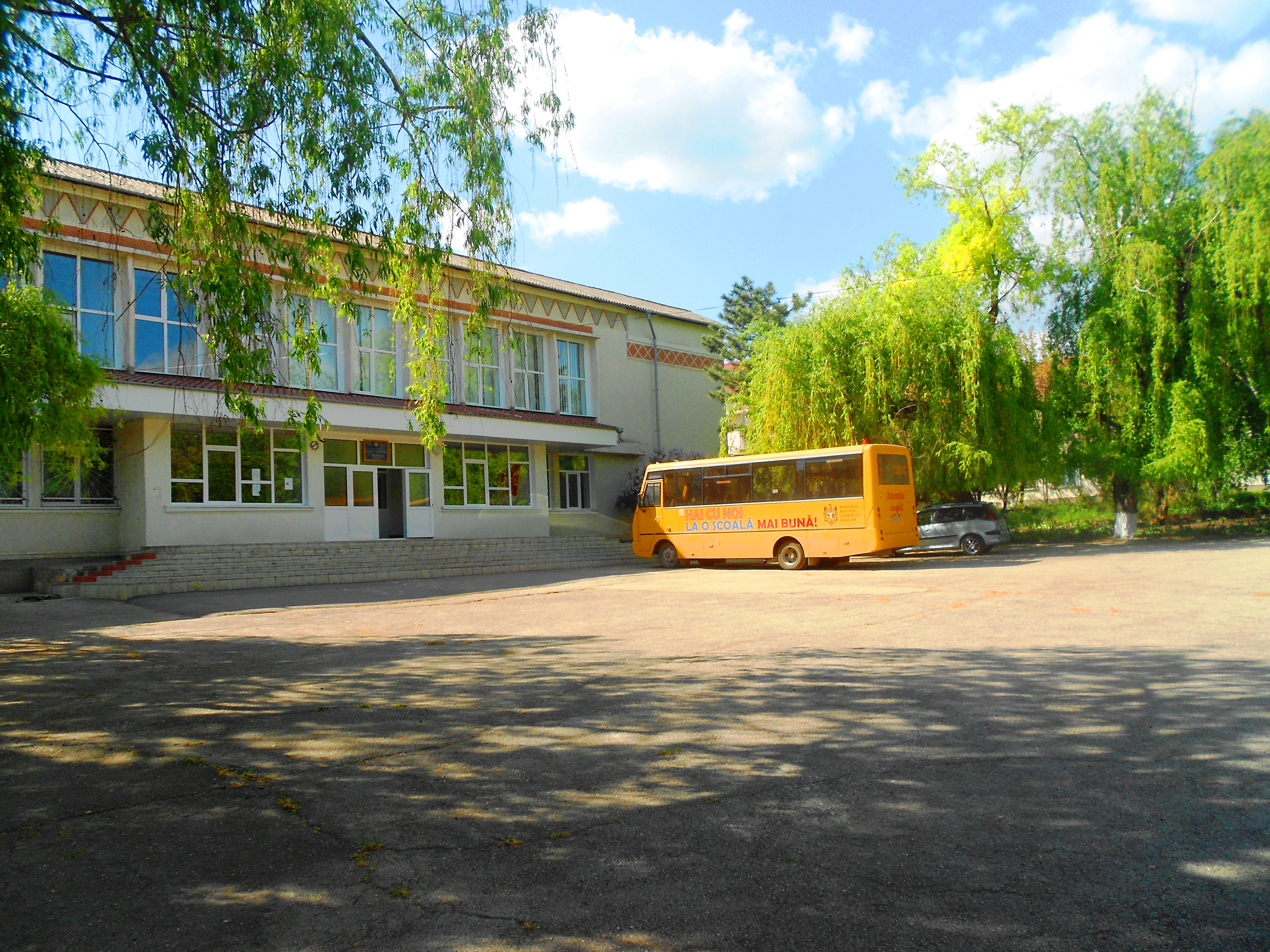 Liceul teoretic C. Negruzzi din Târnova, Dondușeni